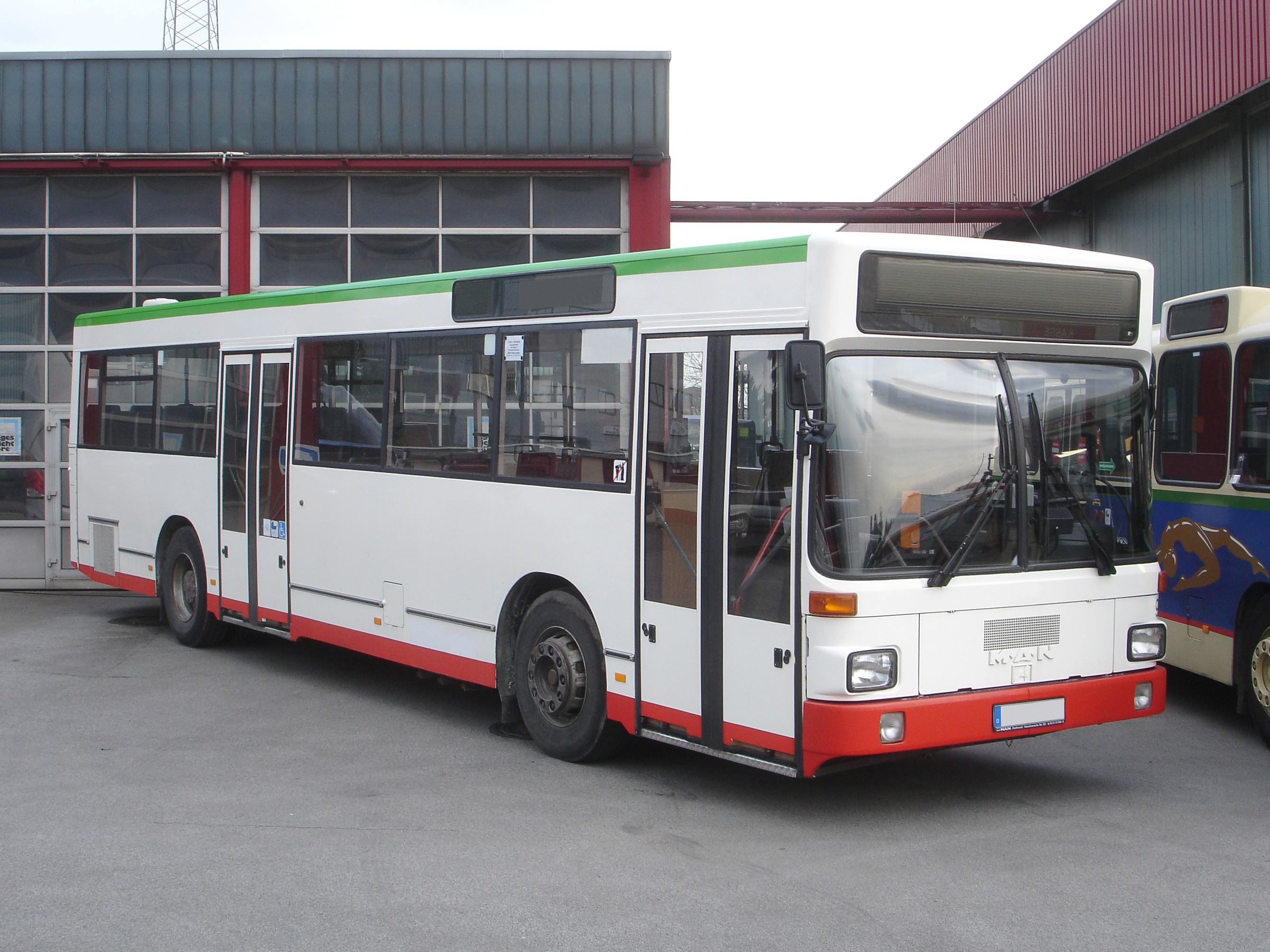 M.A.N. SL 202 Stadtlinienbus